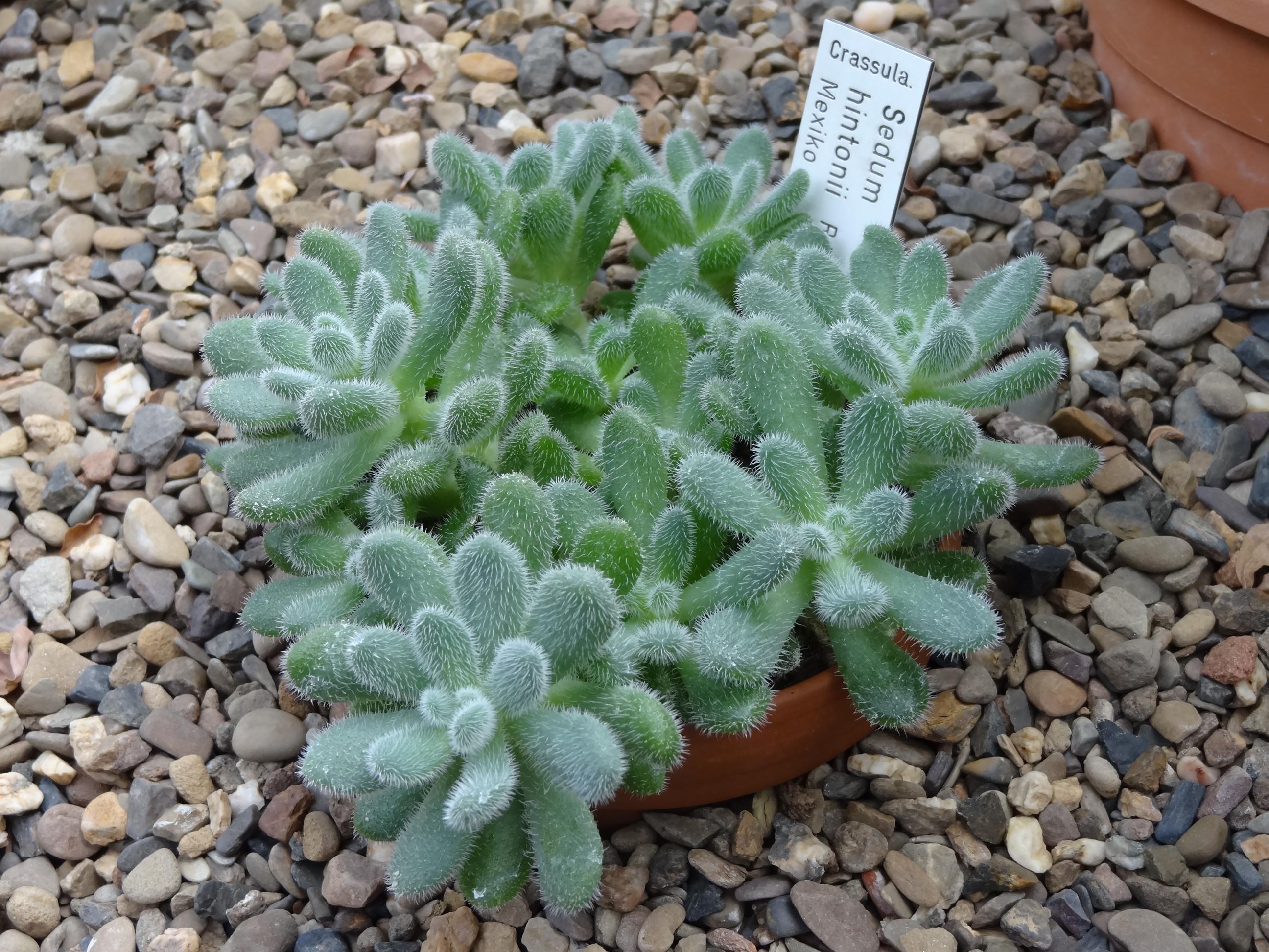 Sedum hintonii, Botanischer Garten Gießen